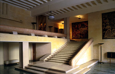 Hall d'entrée de l'ambassade de France au Canada.